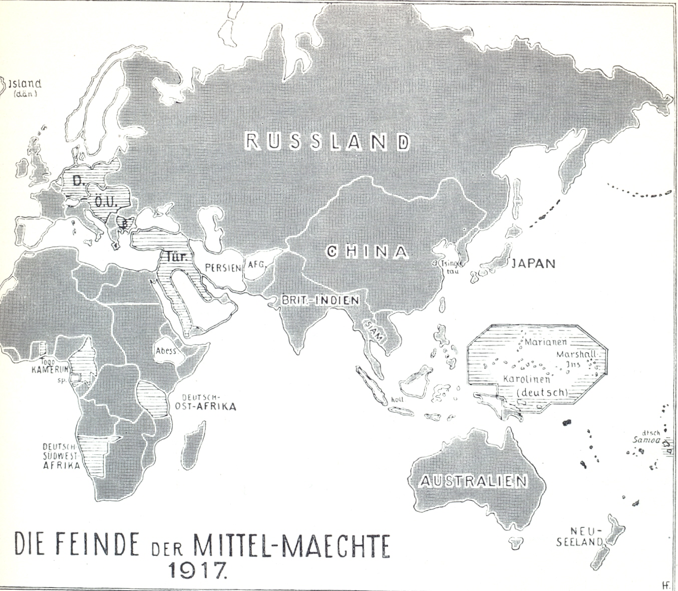 Karte Seite 67: Die Feinde der Mittel-Mächte 1917